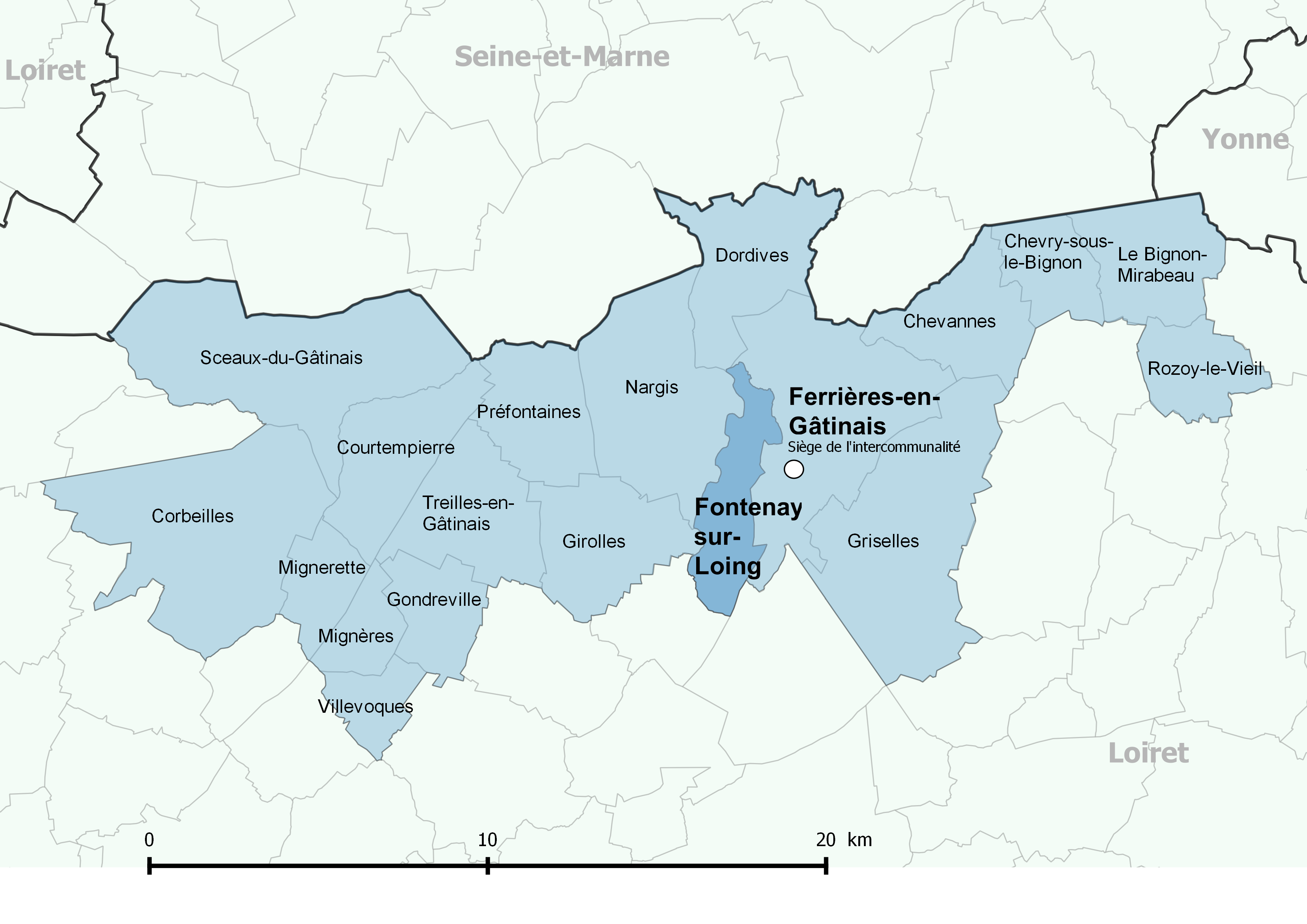 Périmètre de la communauté de communes des Quatre Vallées (Loiret) - Positionnement de la commune de Fontenay-sur-Loing.